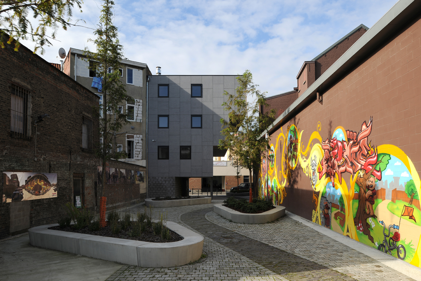 Logements et parc de la petite Senne à Molenbeek. Réalisés dans le cadre du Contrat de Quartier "Ateliers - Mommaerts"